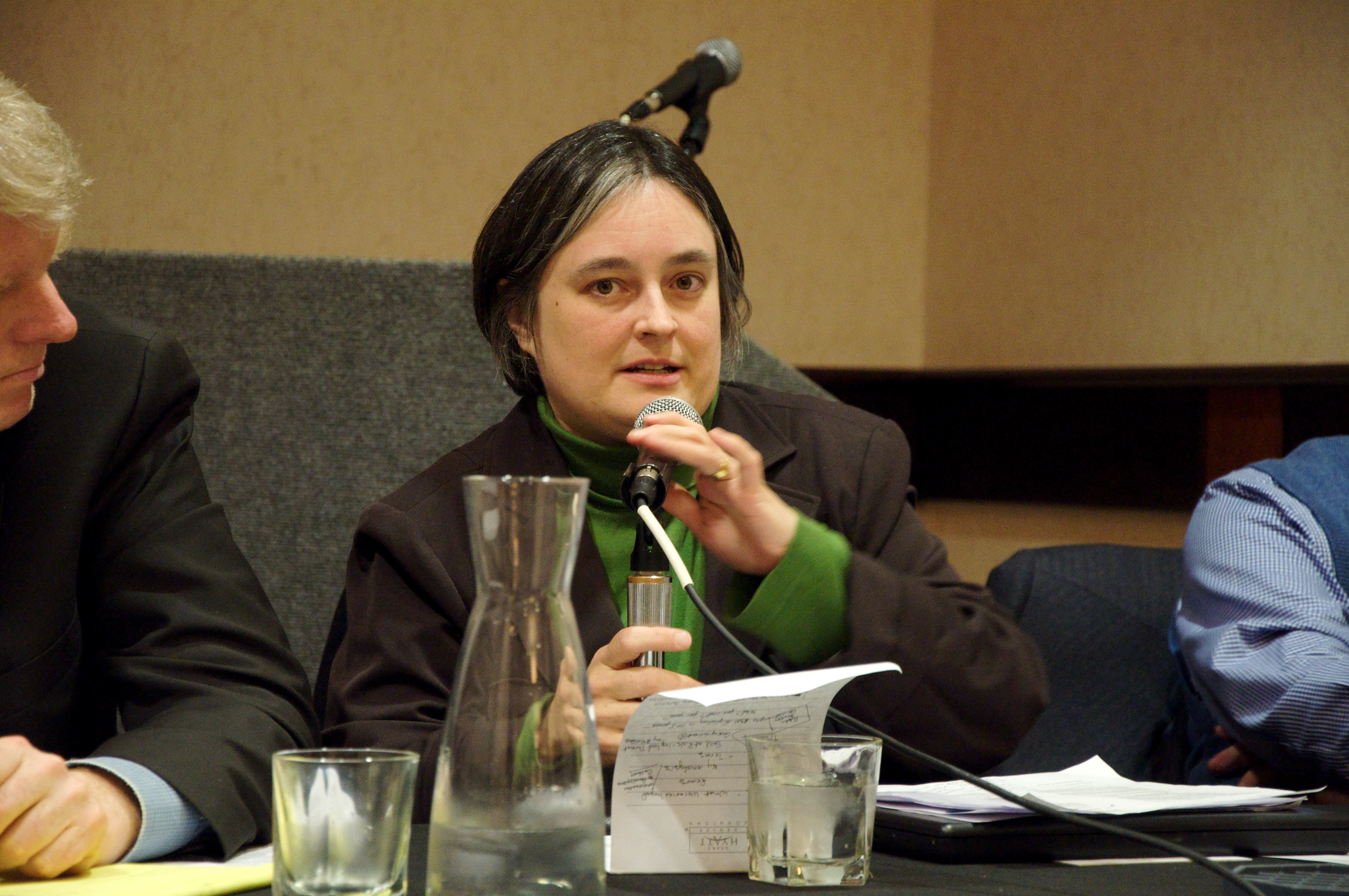 Laura Quilter